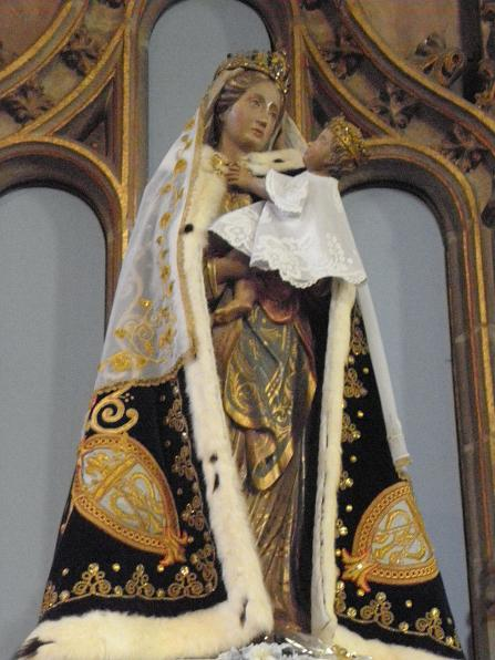 Statue de la Vierge Marie dans la basilique Notre-Dame de La Guerche-de-Bretagne.